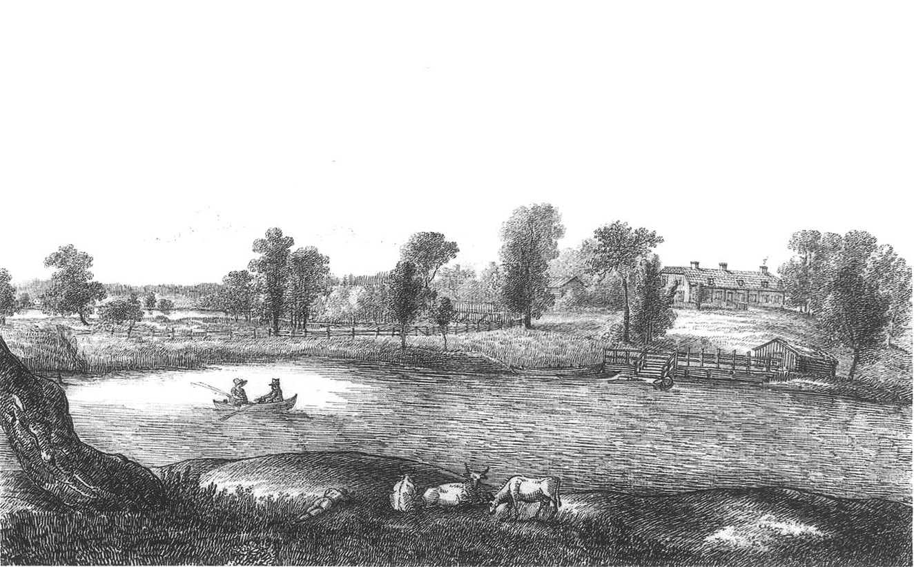 Hustegaholm, Lidingö omkring 1811-1816.